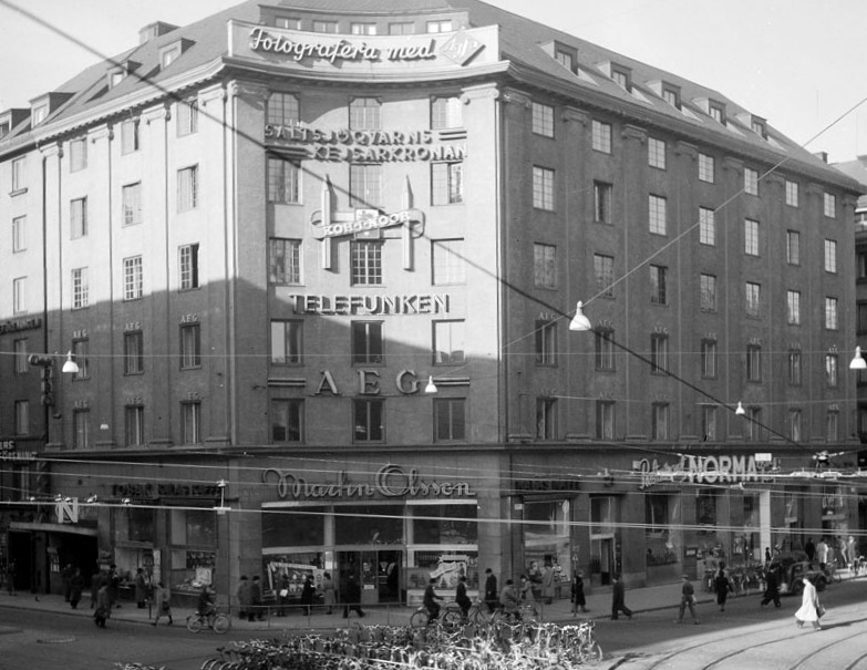 hörnet av Sveavägen och Kungsgatan i Stockholm